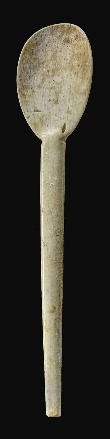 Esta cuchara de hueso procede la la Cueva de l'Or (Beniarrés, Alicante), un yacimiento ocupado desde mediados desede el VI milenio a.C. (datación: 5600 a.C.).